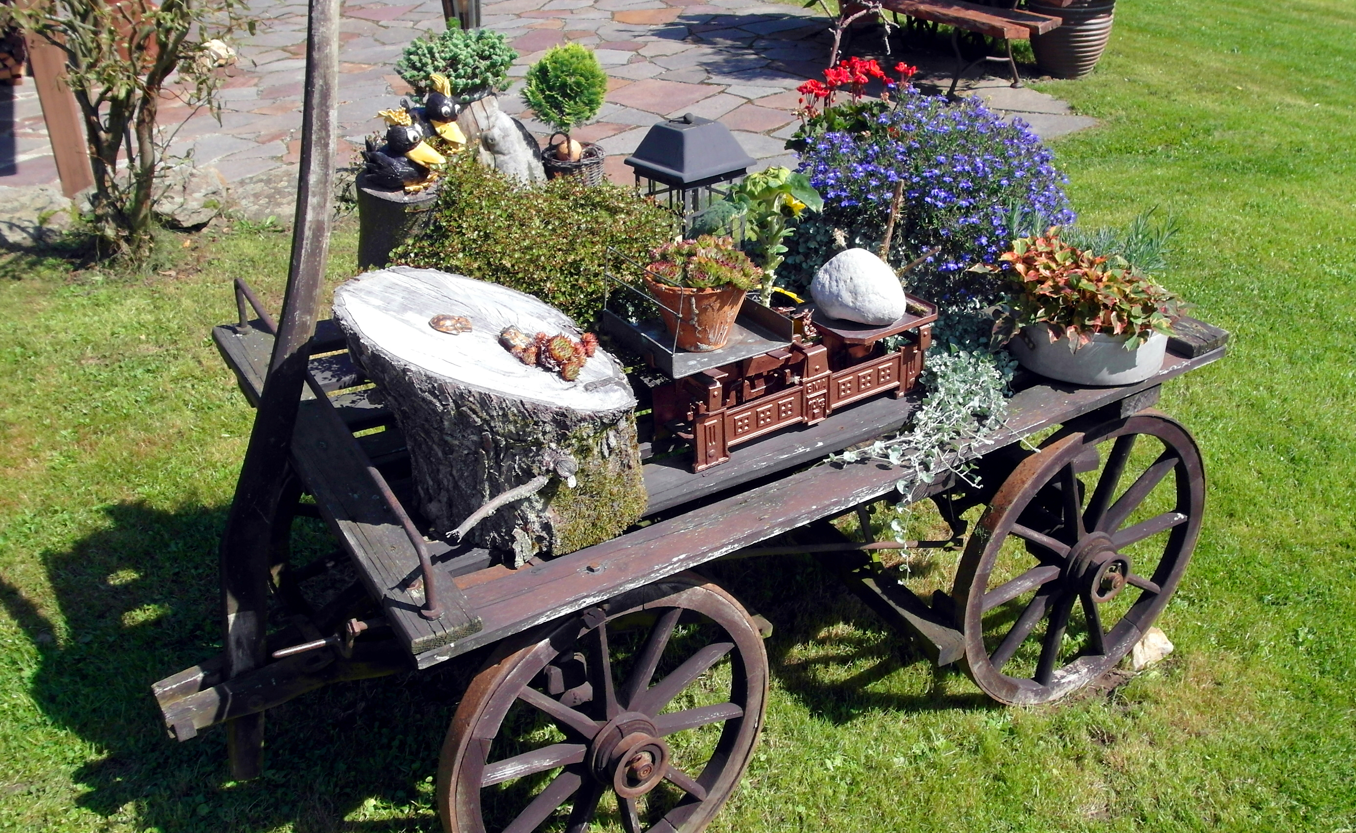 05.09.2017 09488 Neundorf (Thermalbad Wiesenbad), Rittergutsweg / Am Sportplatz (GMP: 50.633550,13.005640): Rittergut Neundorf. Bepflanzer Handwagen im Gutshof. [SAM1716.JPG]20170905115DR.JPG(c)Blobelt